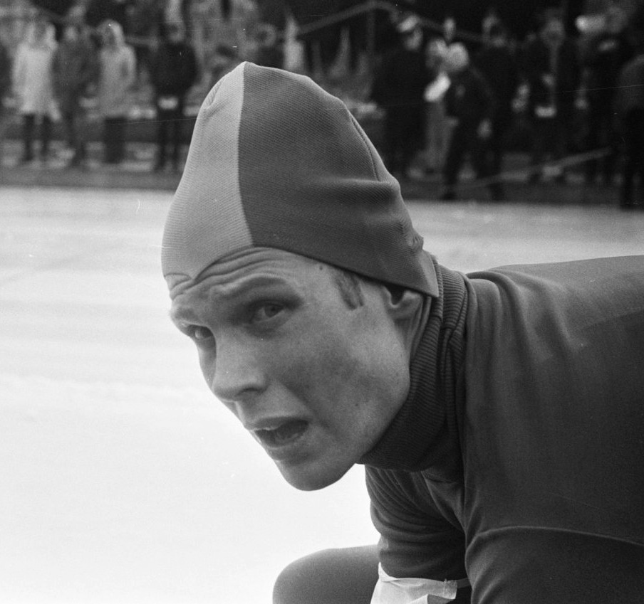 Europese kampioenschappen Schaatsen te Innsbruck. Göran Claeson